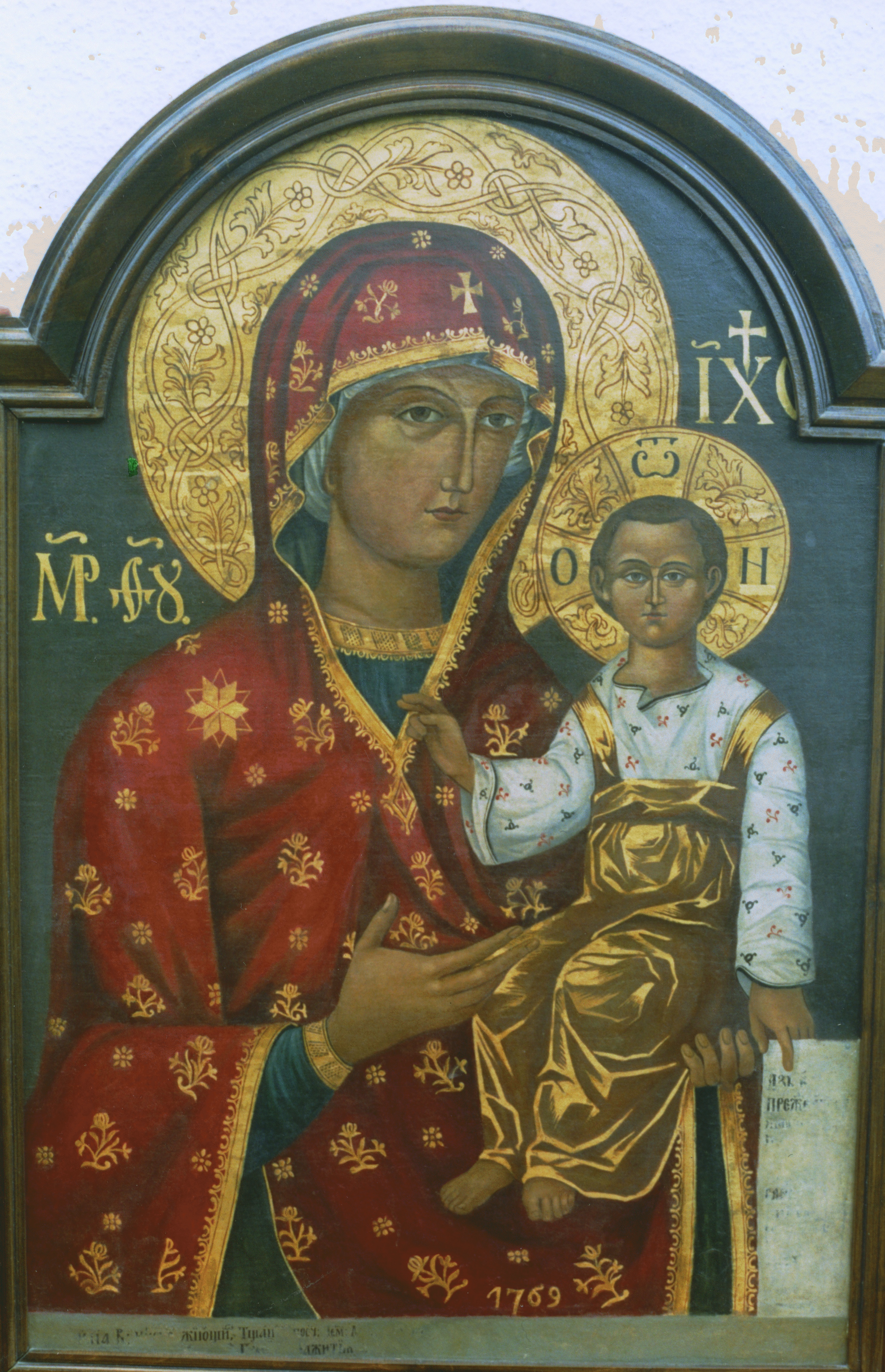 Краснобрідська ікона Божої Матері оригінал. Photo taken by Jozafát Vladimír Timkovič, OSBM